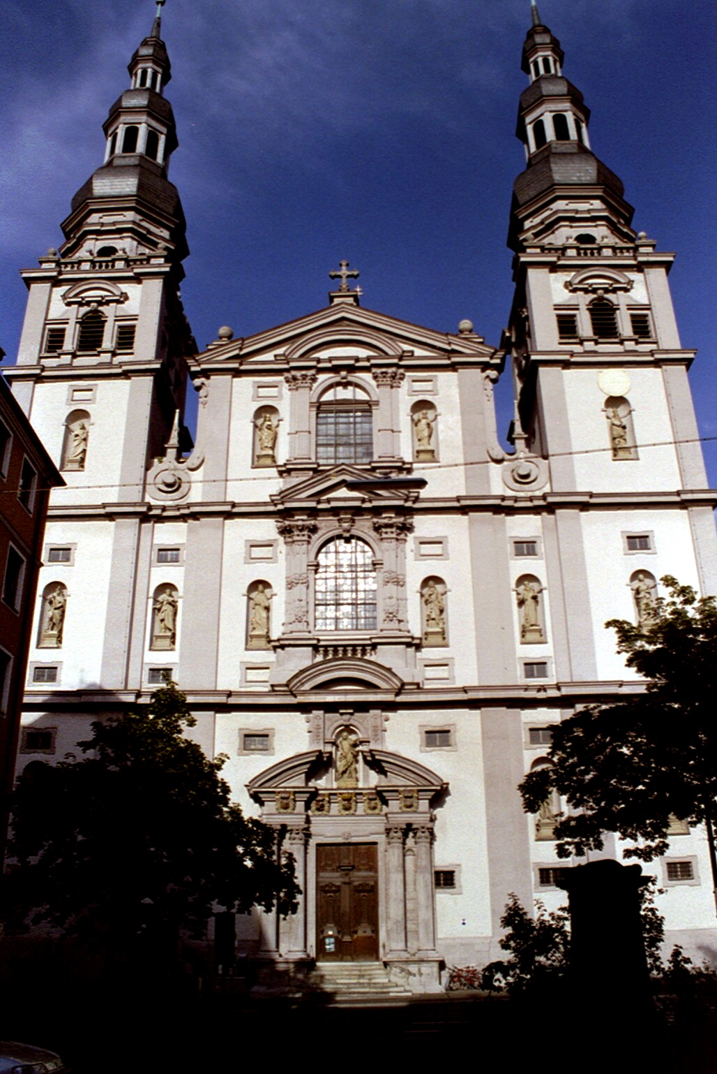 Hauger Stift in der Bahnhofstraße